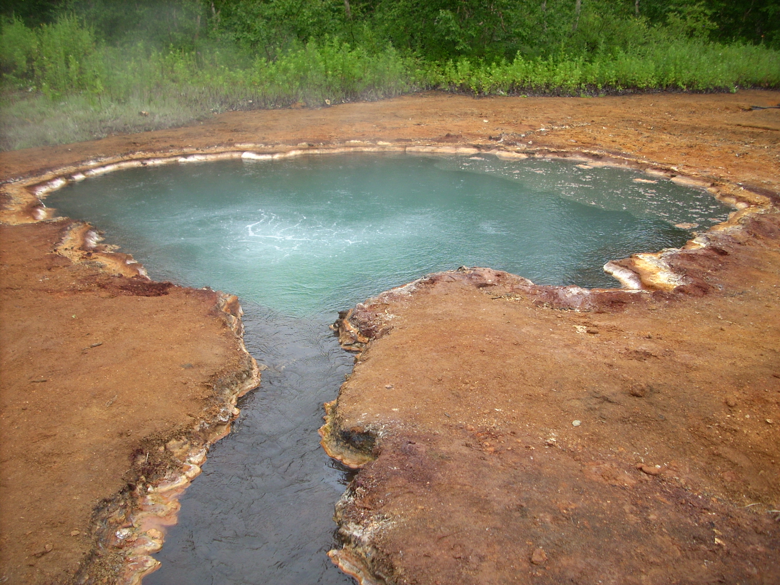 гидротермальный источник - грифон Иванова, в природном парке "Налычево" на Камчатке. фото 2008 года.